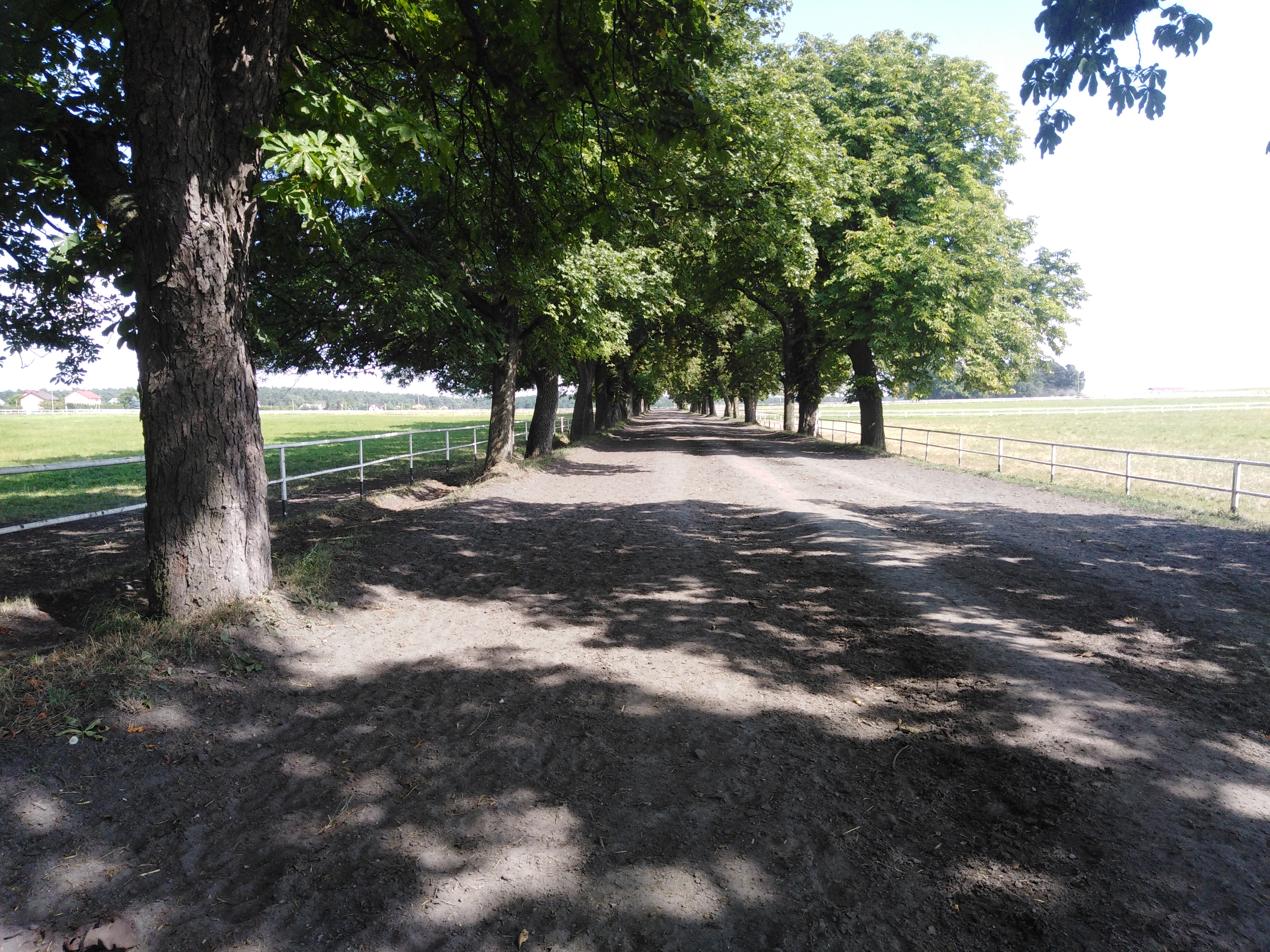 Aleja lipowa